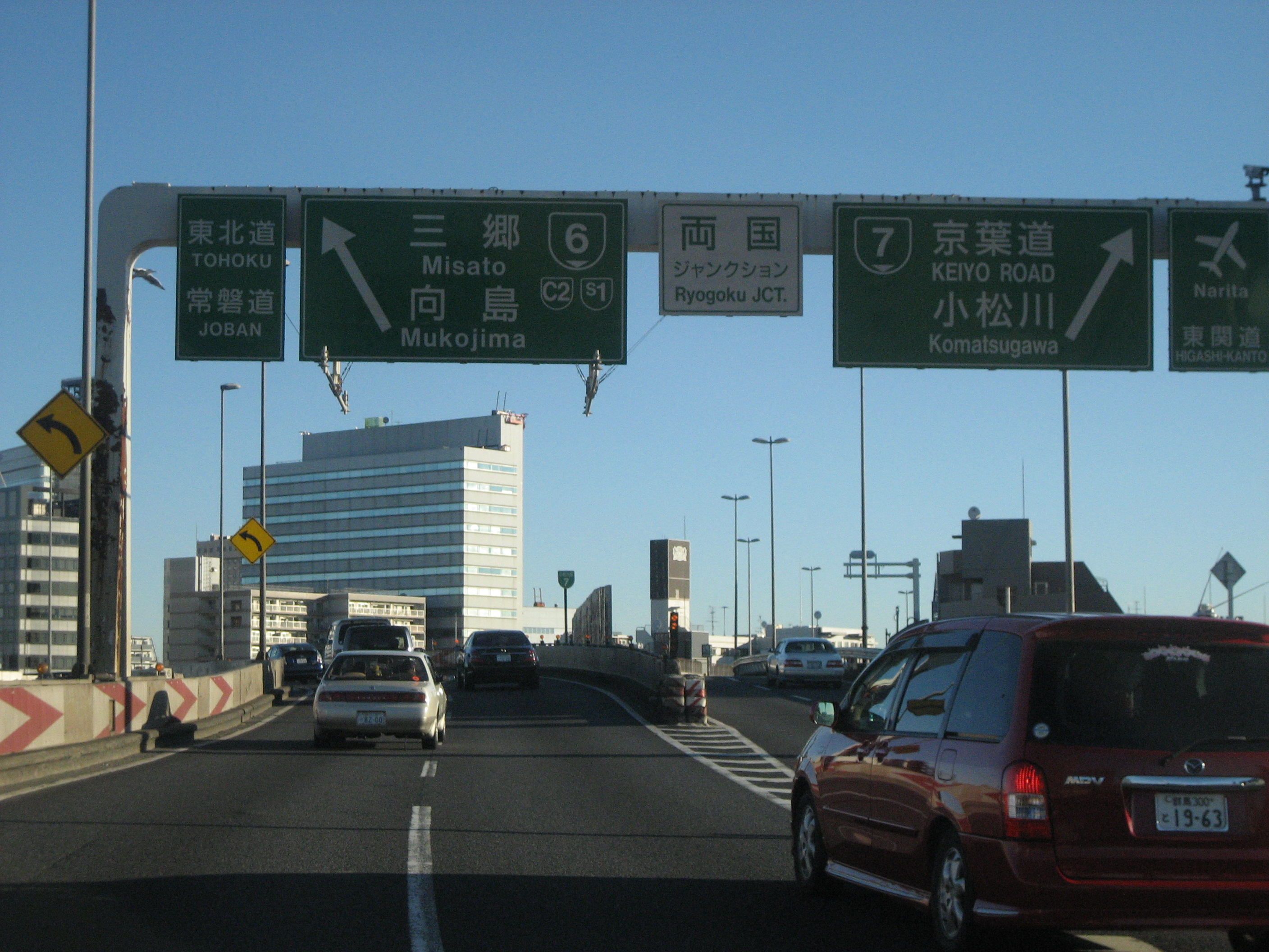 首都高速両国JCT（下り）